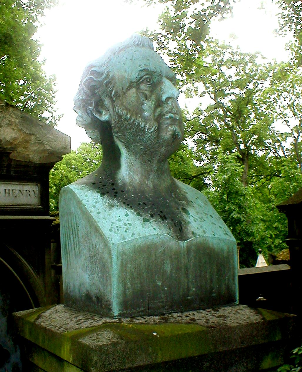 Cimetière du Père-Lachaise - Division 4 Alexandre Ledru-Rollin (1807-1874) politicien français, buste par Robert David d'Angers Prise de vue personnelle Siren-Com 21:57, 1 June 2006 (UTC)